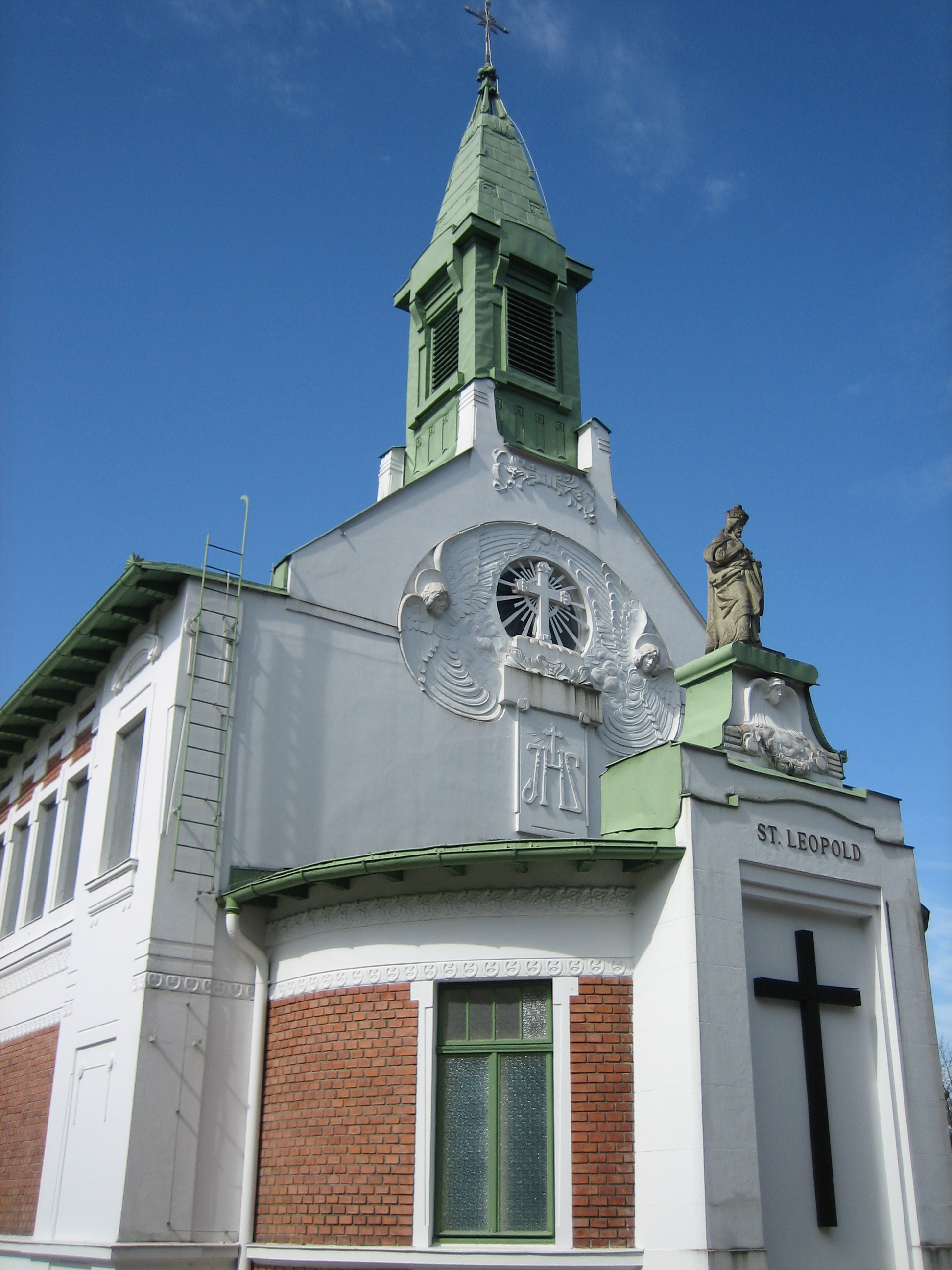 Amstetten-Mauer. Lower Austria. Austria. Landesklinikum Mostviertel Amstetten-Mauer. Chapel of the hostpital, Art Noveau. Amstetten-Mauer. Niederösterreich. Österreich. Landesklinikum Mostviertel Amstetten-Mauer. Krankenhauskapelle, Jugendstil. Author: Dr. Martin Hirsch. Source: Own Image.